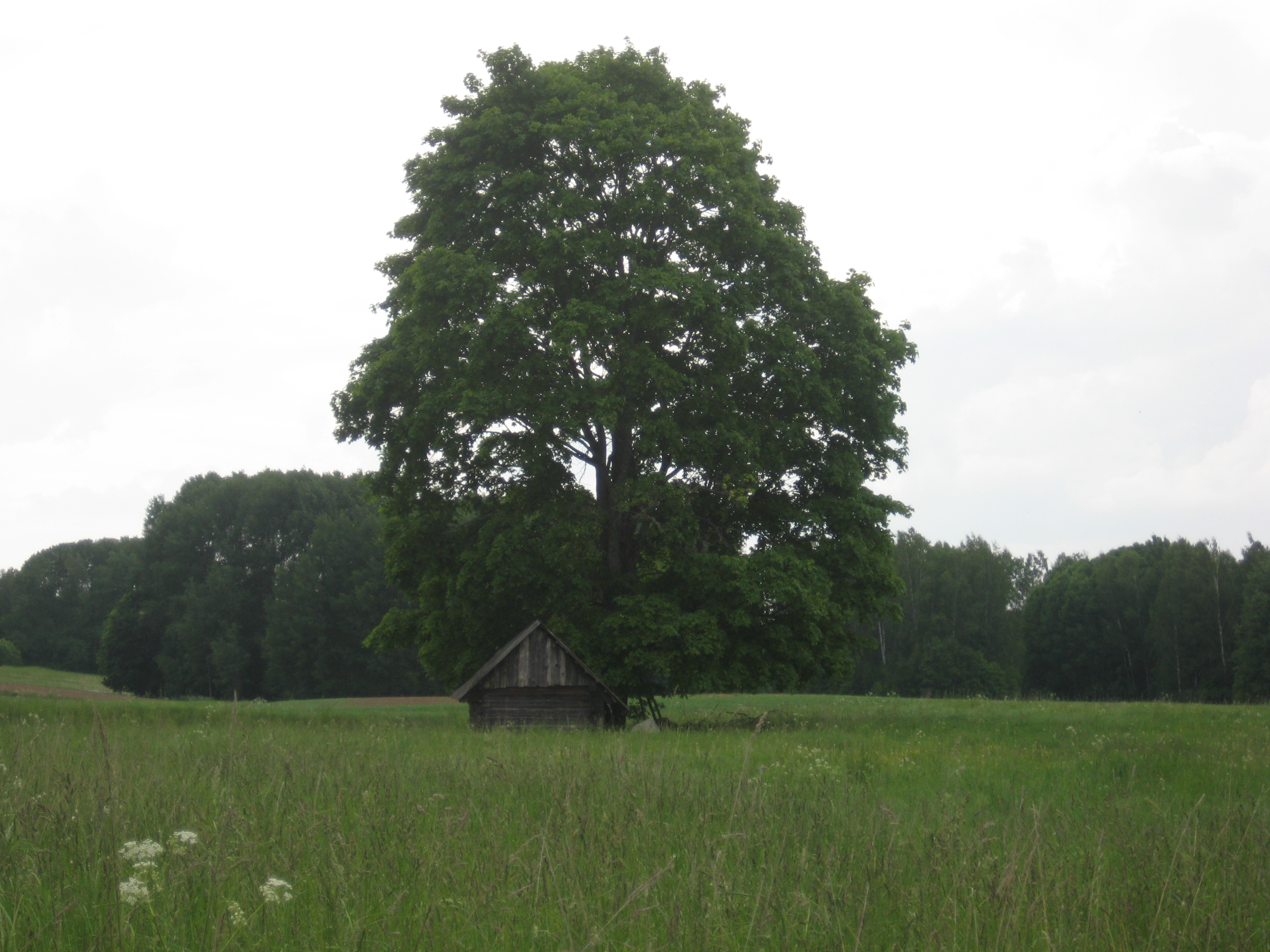 Meldučiai 42271, Lithuania